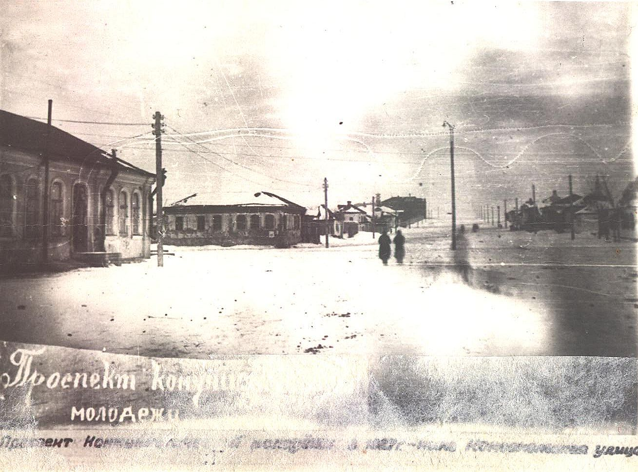 1927г.-проспект Коммунистической молодежи (затем Комсомольская)